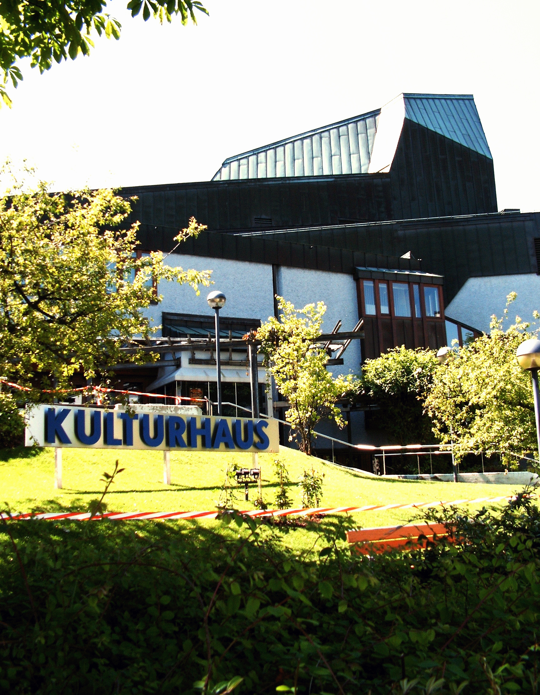 Kulturhaus in Lüdenscheid